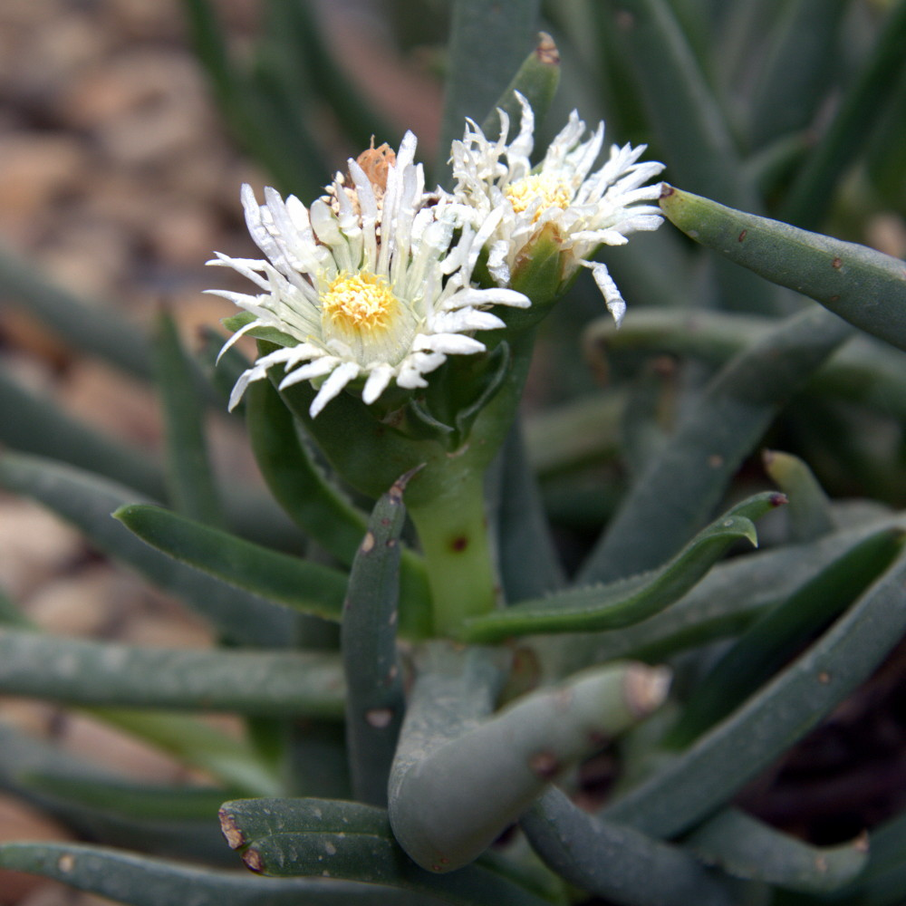 Bergeranthus sp.